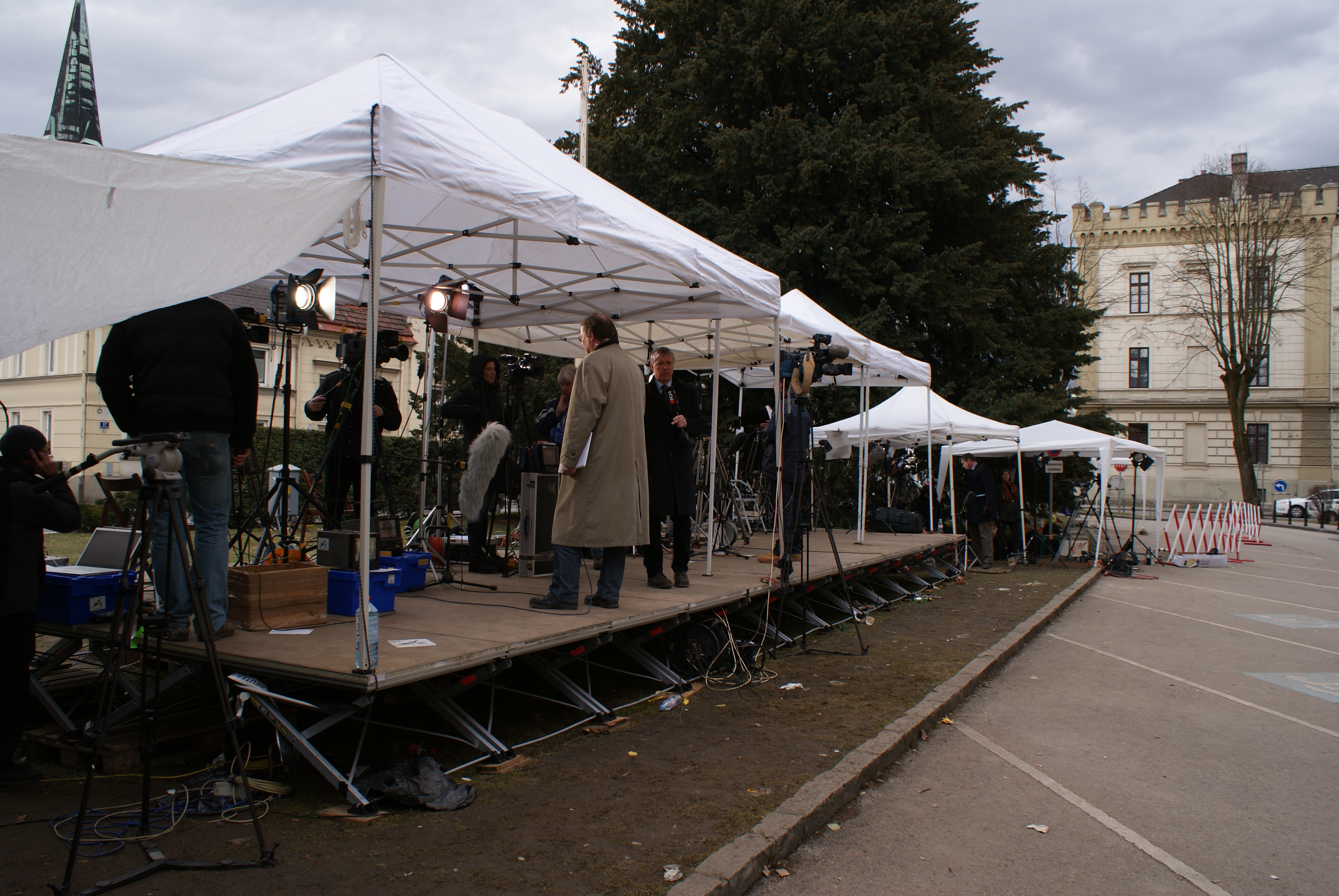 Pressetribüne beim Prozess zum Kriminalfall von Amstetten in St. Pölten